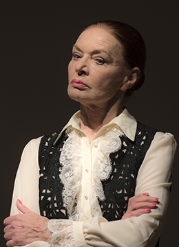 Народная артистка СССР Людмила Чурсина